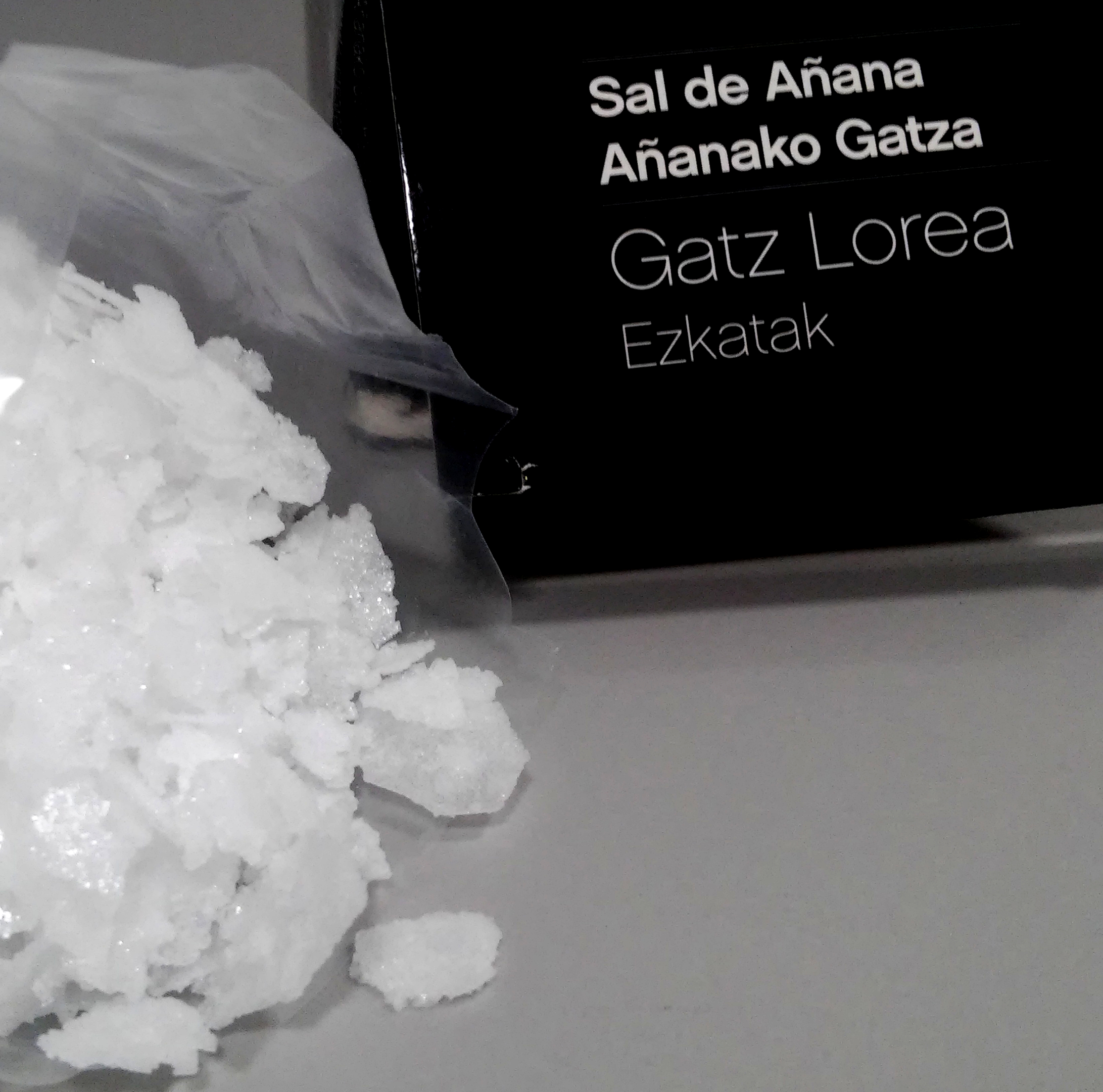 Añanako gatz lorea